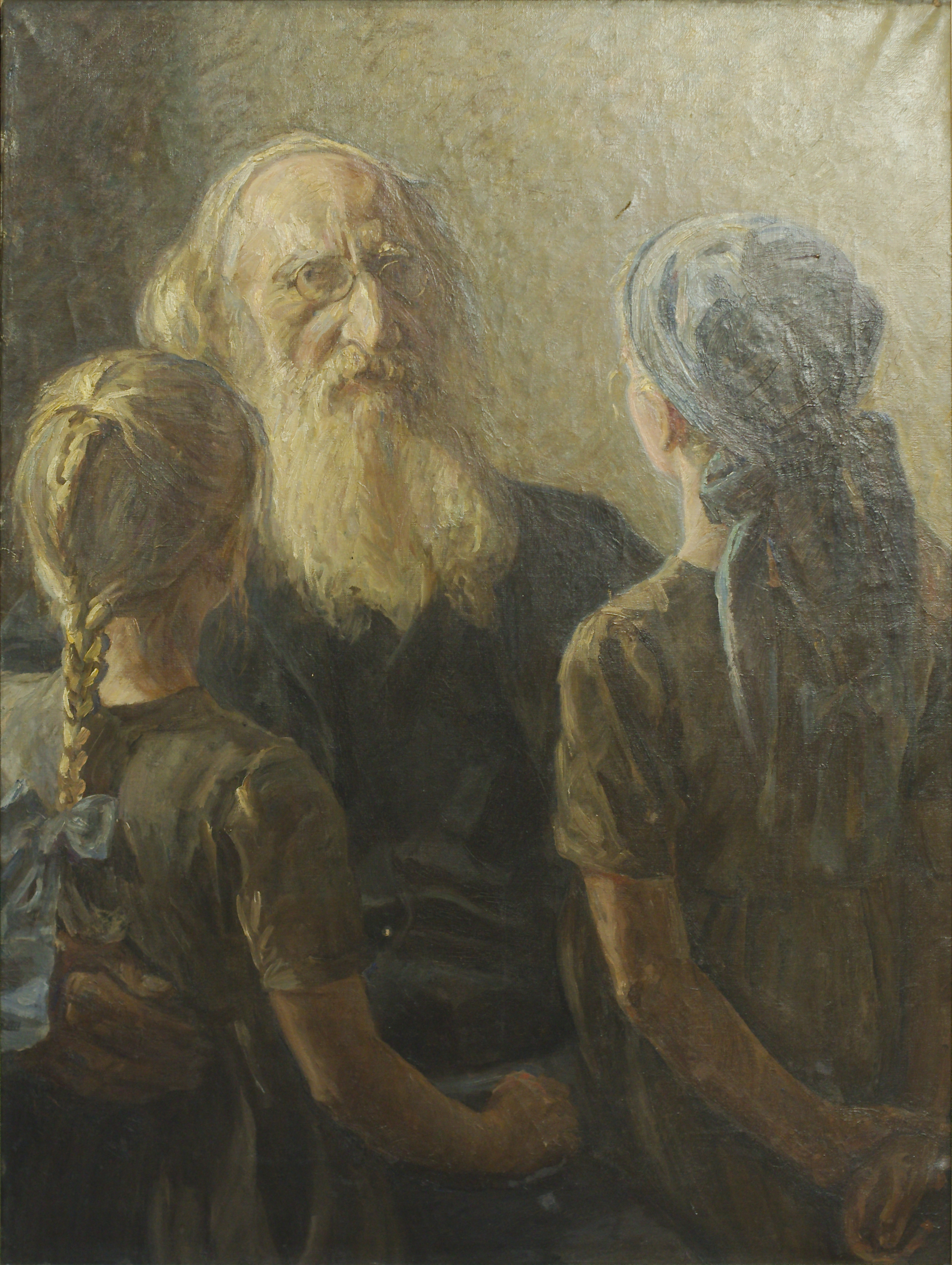 Gamle historier, malet efter lærer Tofte, "De sønderjyske piger"s far